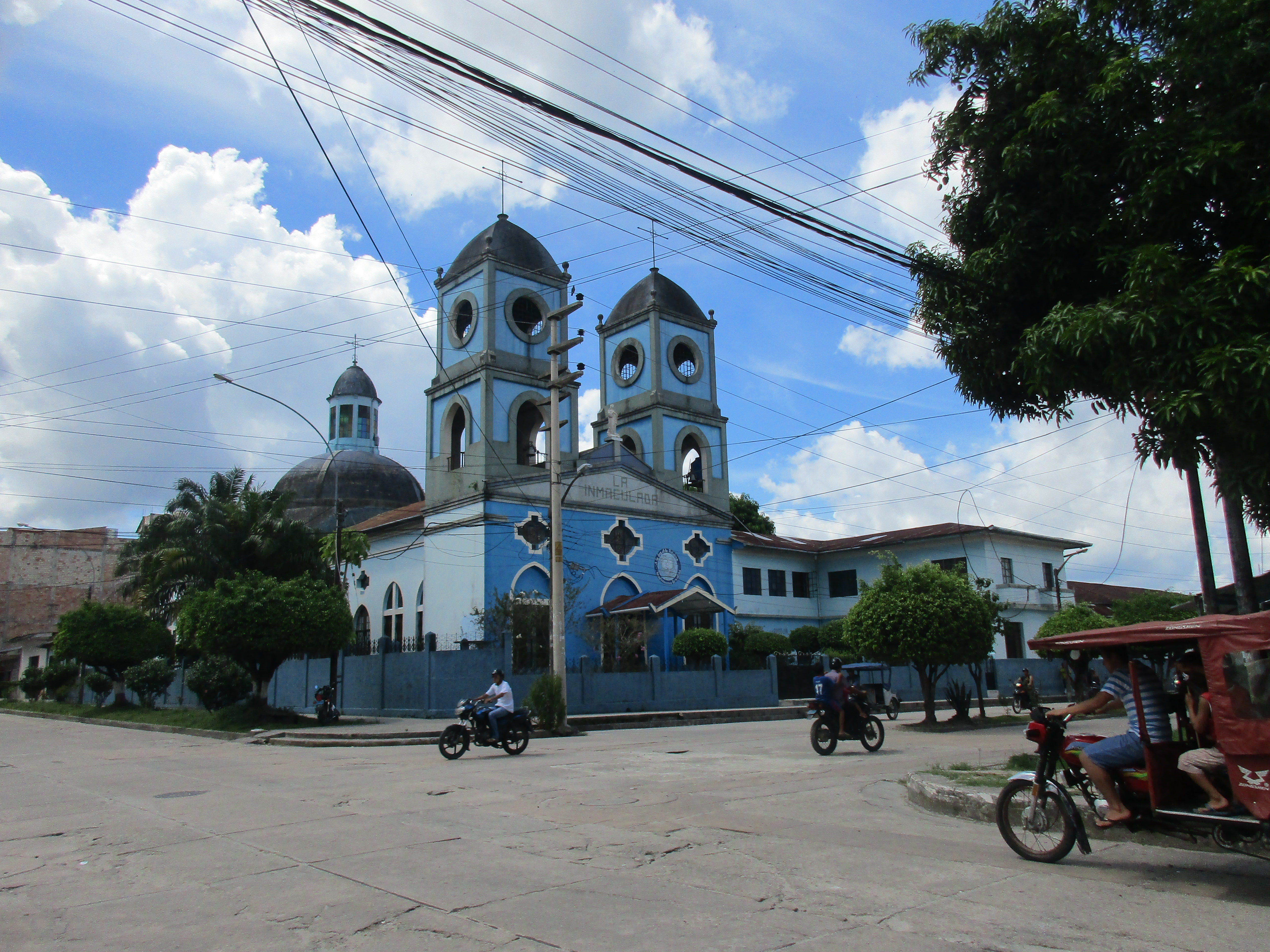 Iglesia purisima de Iquitos